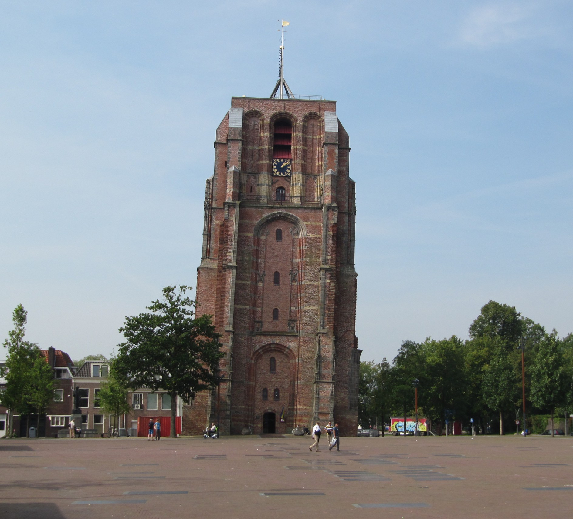 RM24331 Leeuwarden - Oldehoofsterkerkhof.jpg